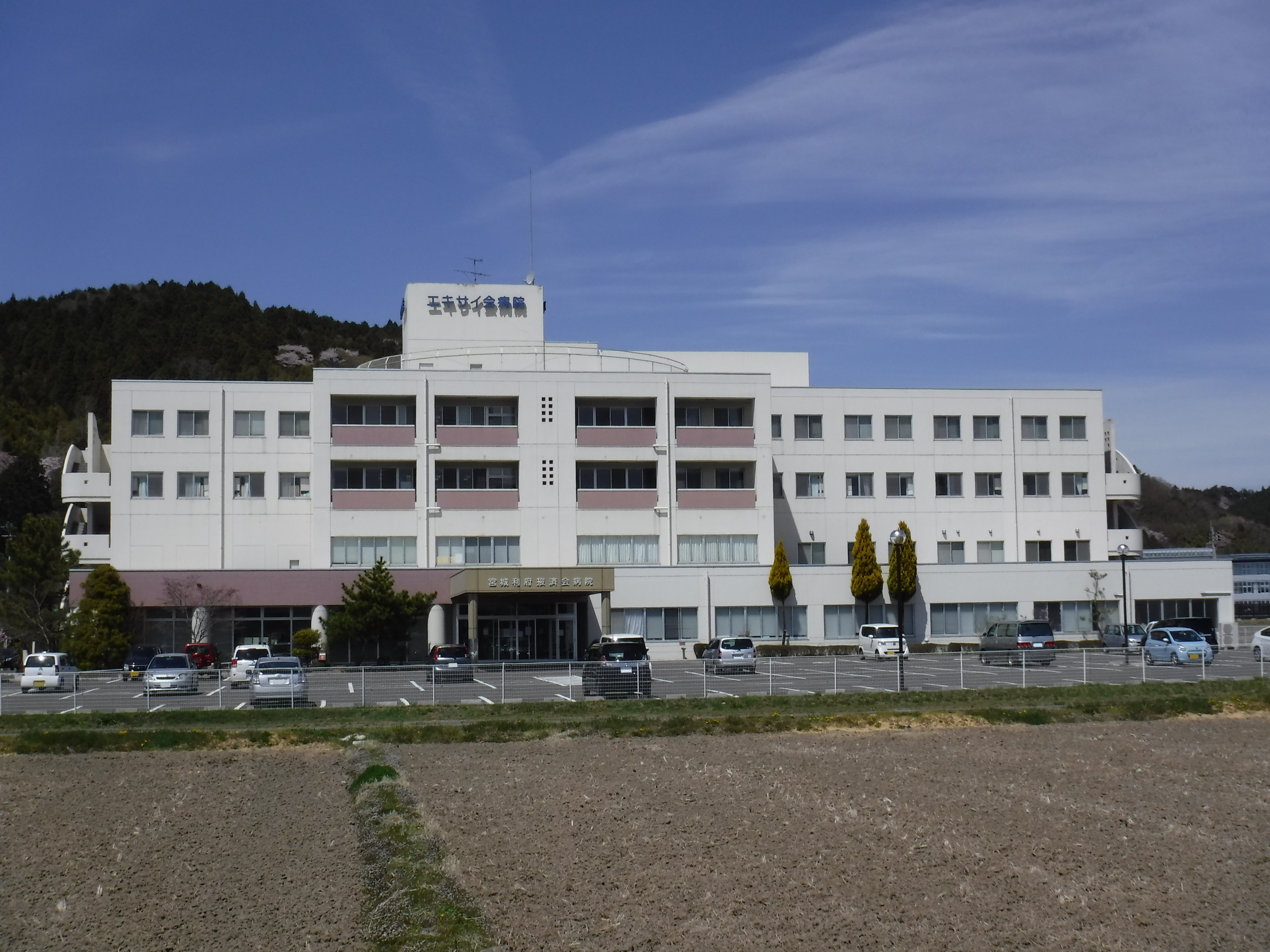 宮城県利府町に所在する宮城利府掖済会病院